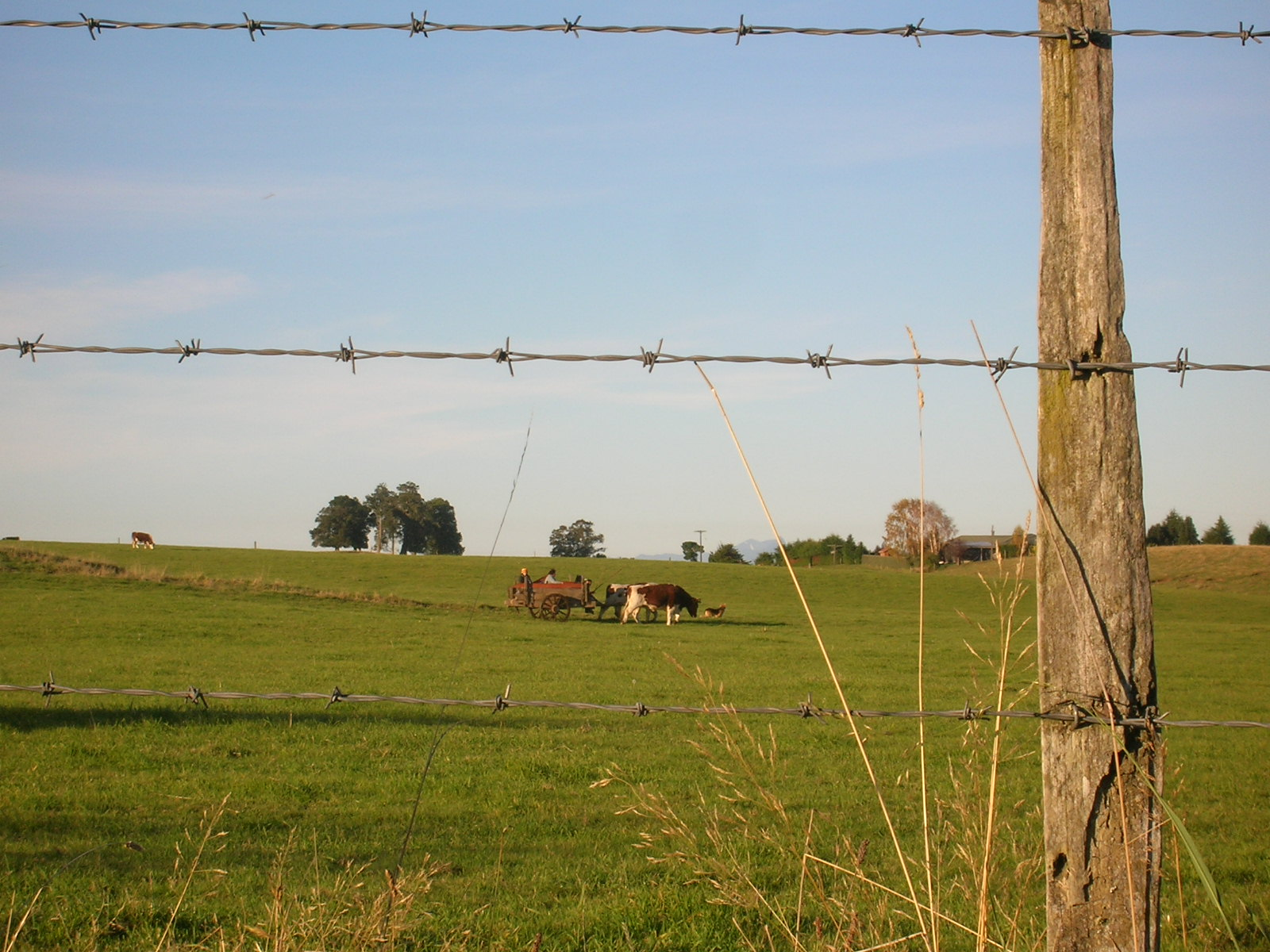 Paisaje rural con carreta, cercanías de Llanquihue y Puerto Varas, Sur de Chile. Un poco a la derecha y detrás de la carreta se puede descrubir la silueta de las montañas de Los Andes